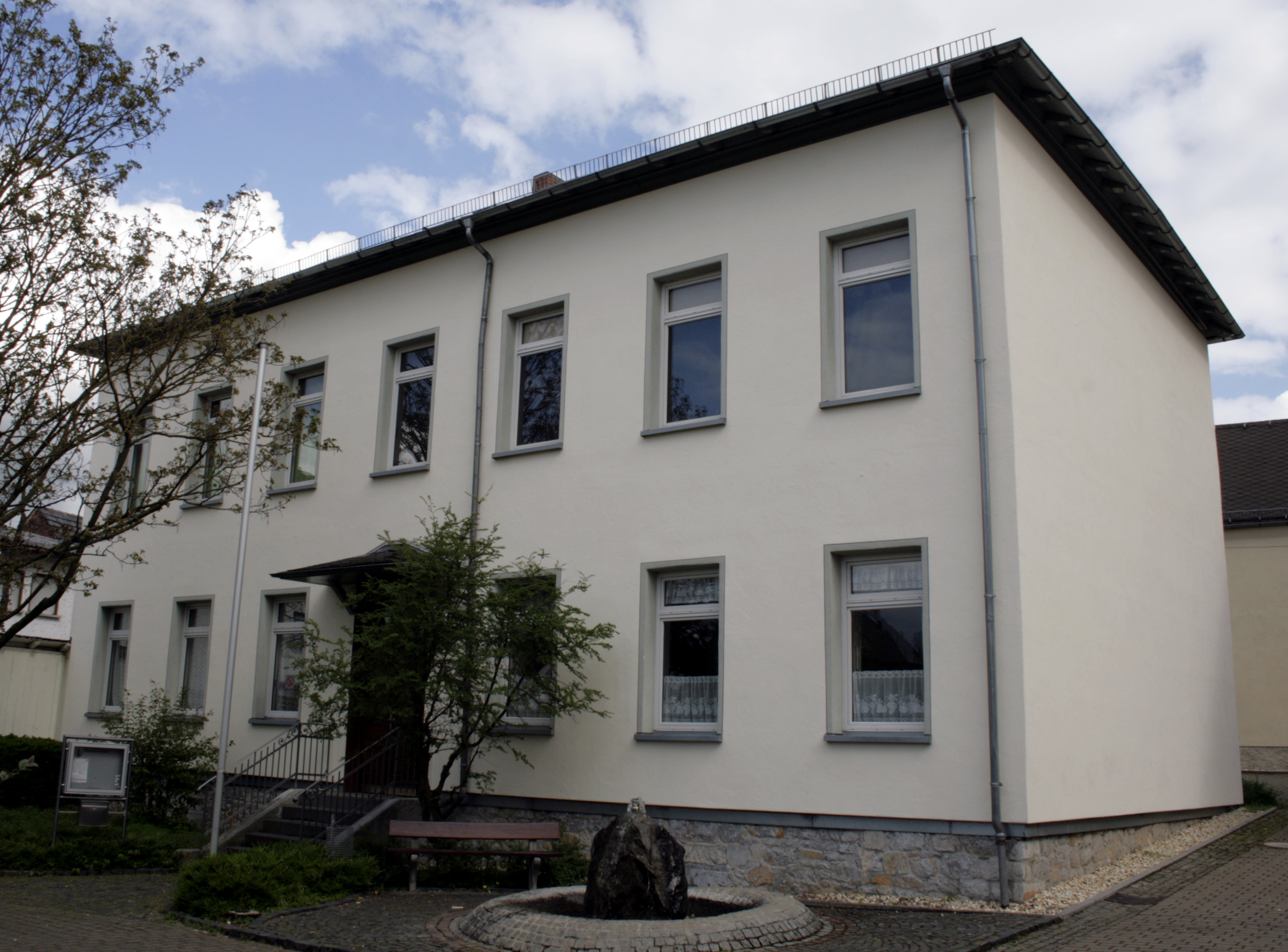 Alte Schule, heute Gemeinschaftshaus, Hünfelden-Heringen, Deutschland